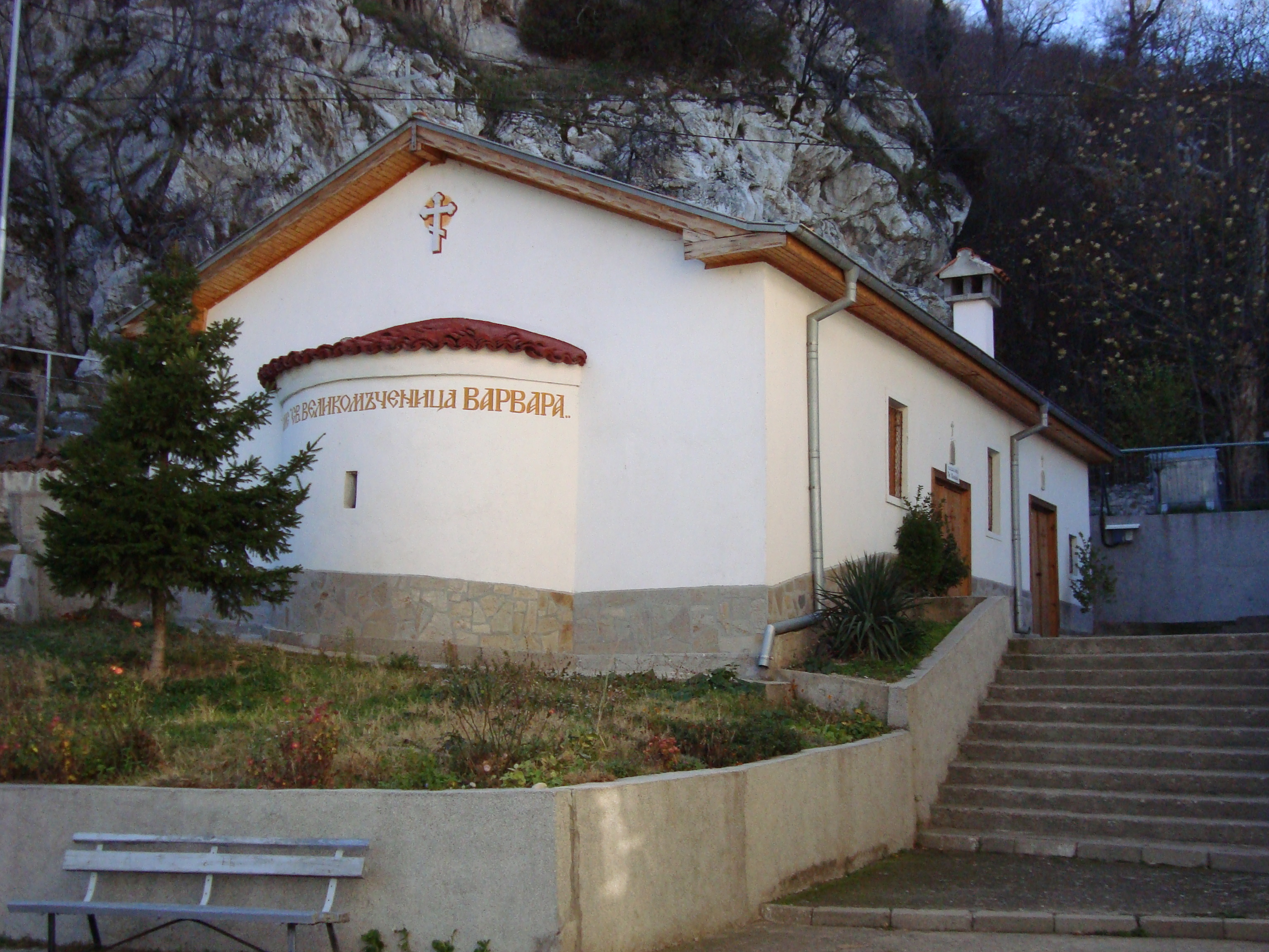 Параклис "Света Великомъченица Варвара", Асеновград